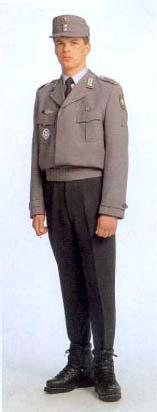 Beschreibung: deutscher Soldat mit Skibluse, Keilhosen und Bergstiefel; "Anzugordnung für die Soldaten der Bundeswehr" ZDv 37/10 (offen), Bild 209/10, Stand Juli 2003